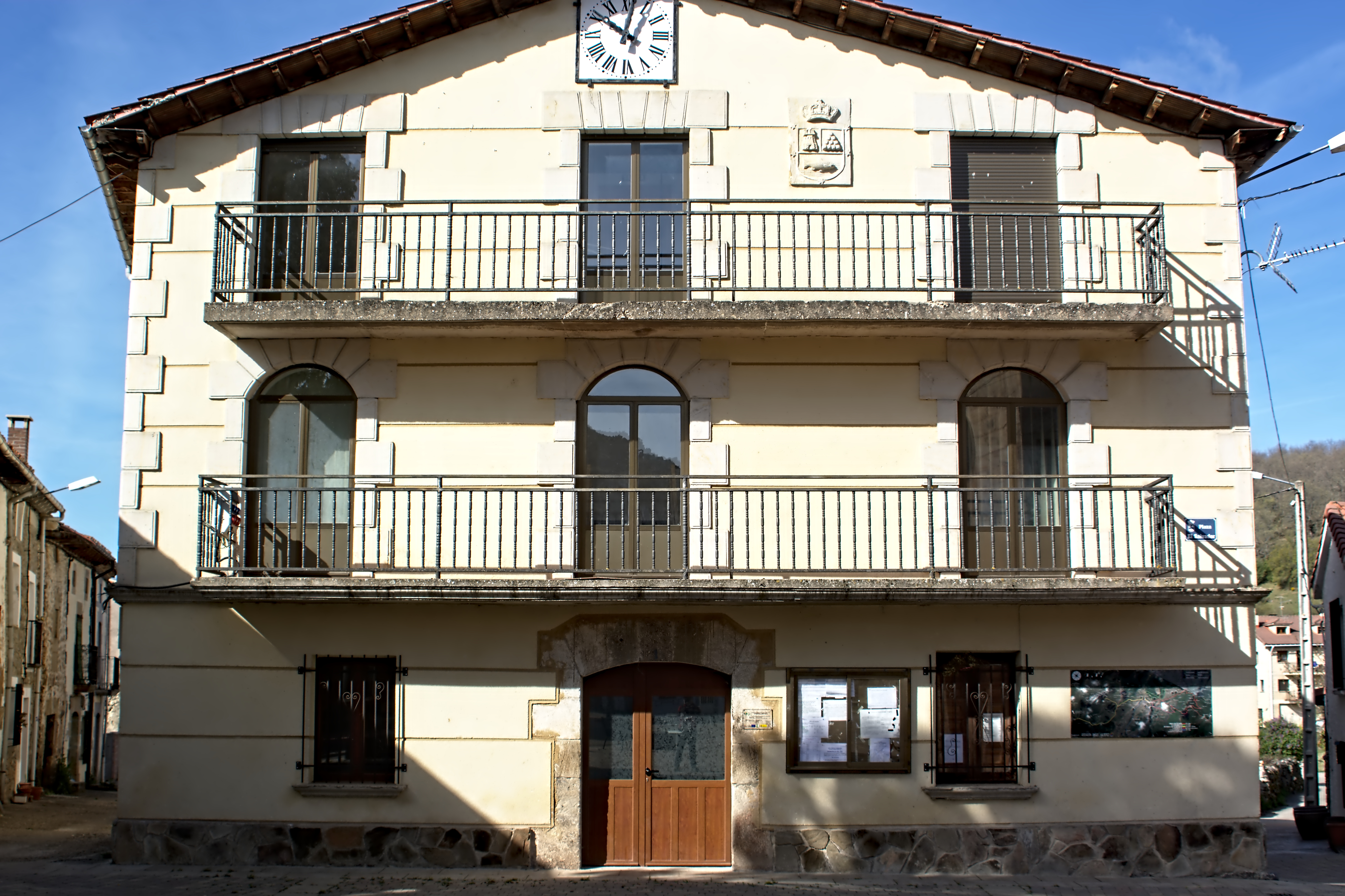 Barbadillo del Pez - Ayuntamiento